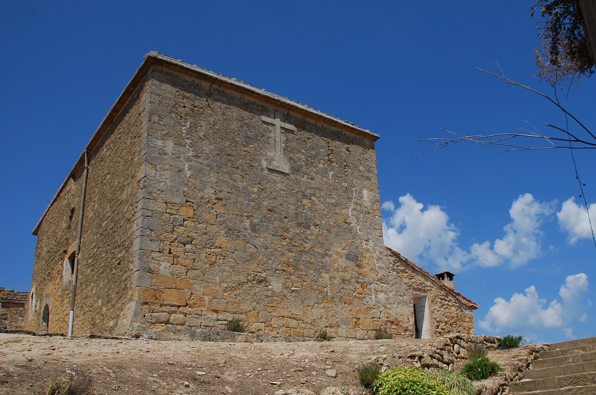 Ermita del castillo de Monjardín en Villamayor de Monjardín (Navarra, España)